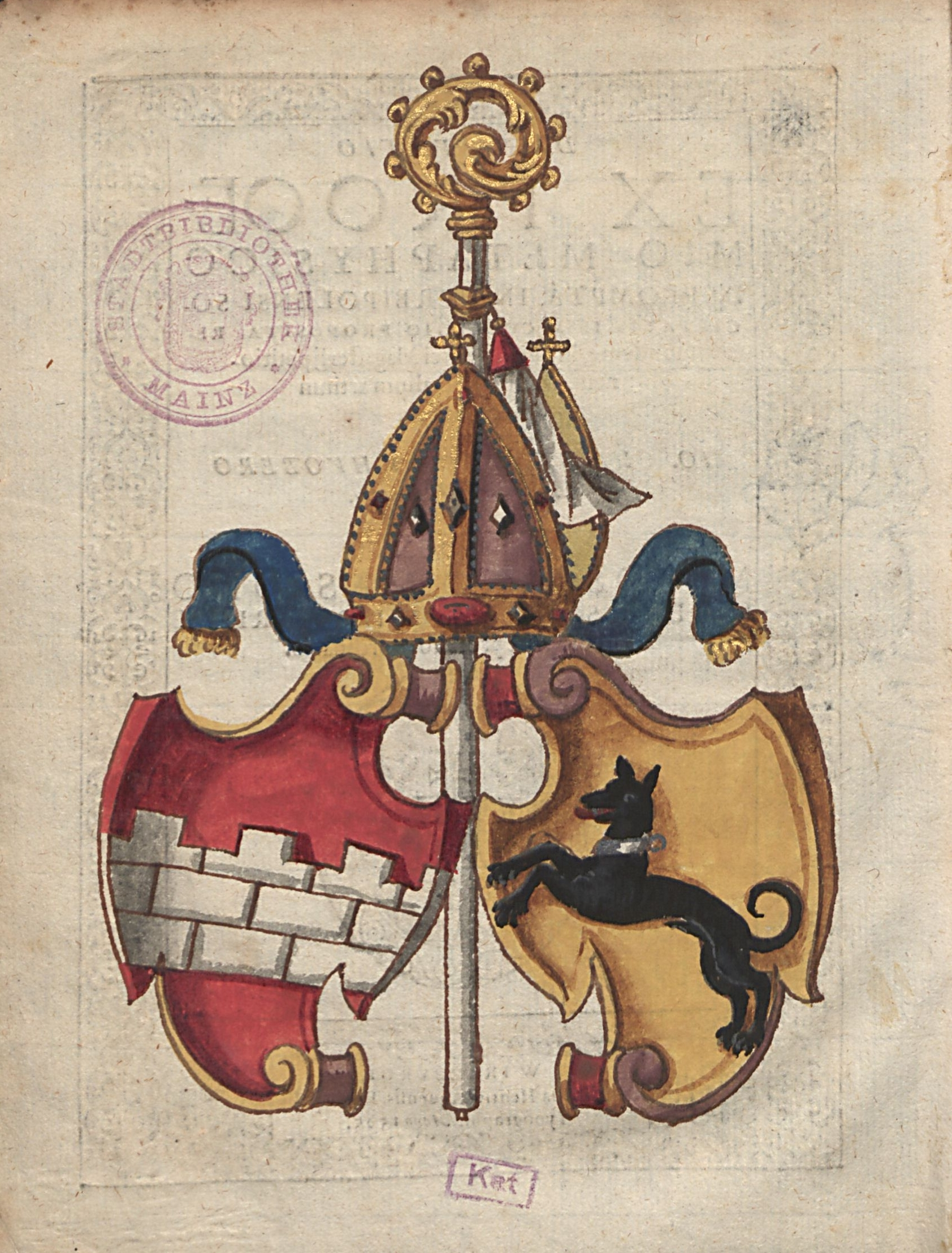 Koloriertes handgezeichnetes Wappen von Hieronymus Frei (Abt des Klosters Muri, Schweiz. * ca. 1535 in Diessenhofen; † 4. August 1585 in Muri) enthalten in: DISPVTATIO EX PROOEMIO METAPHYSICO DEPROMPTA, : IN HERBIPOLENSI SOCIETATIS IESV COLLEGIO PROPOSITA, REspondente, in philosophici Magisterij petitionem, erudito liberalium artinm Baccalaureo. IO. CHRISTOPHORO HVOBERO Bremgartensi Heluetio. PRAESIDENTE M. TOSSANO MASIONO LEODIO SOCIETATIS IESV, PRIMAE Philosophiae professore ordinario / Mashon, Toussaint ; Huober, Johannes Christoph. Wirtzbvrgi : Henricus Aquensis, 1585. Umfang: [12] Bl. : Ill. (Holzschn.). Bibliographischer Nachweis: VD16 M 1328. Signatur der Wissenschaftlichen Stadtbibliothek Mainz: XIII n:4º /311 a, 32 (Rarum)